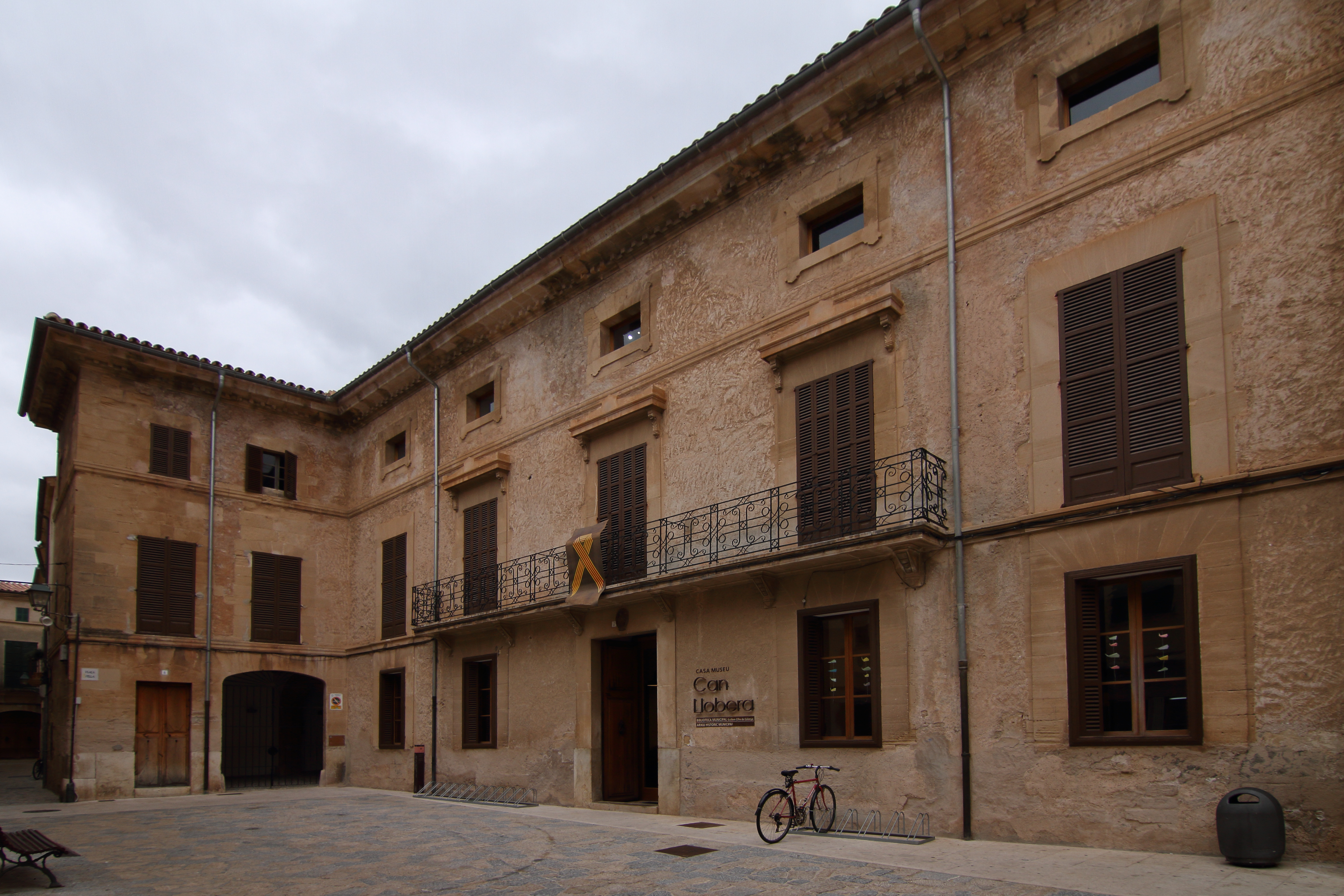 Pollenca, Biblioteca Municipal, Can Llobera